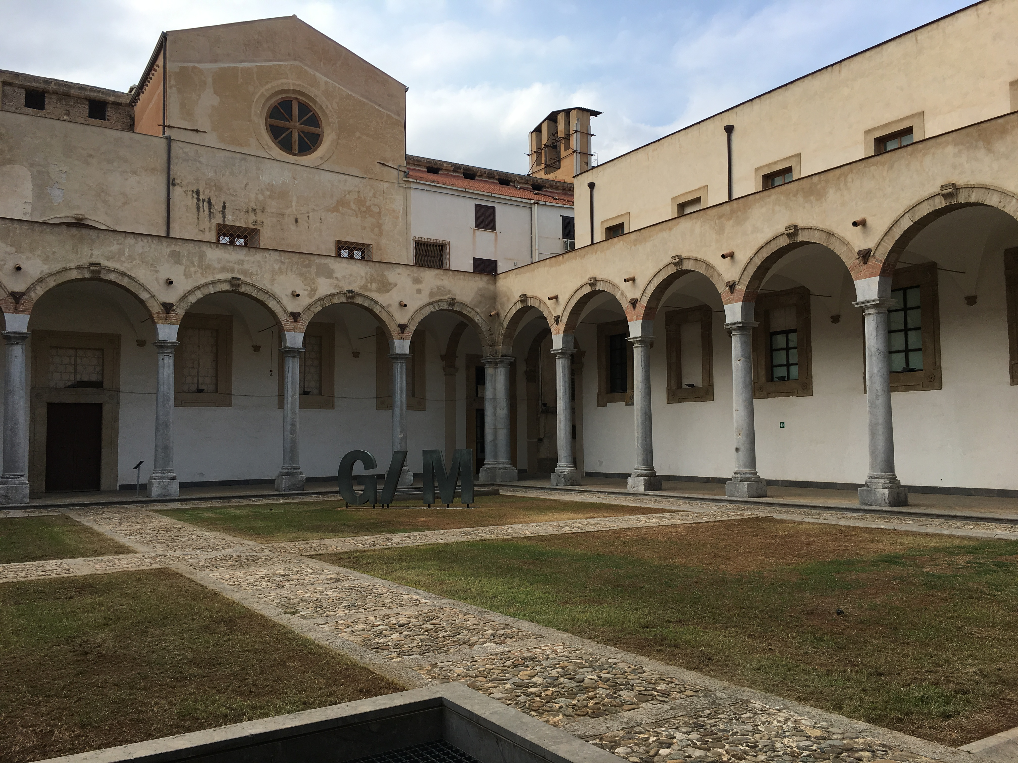 Cortile Gam. Palermo